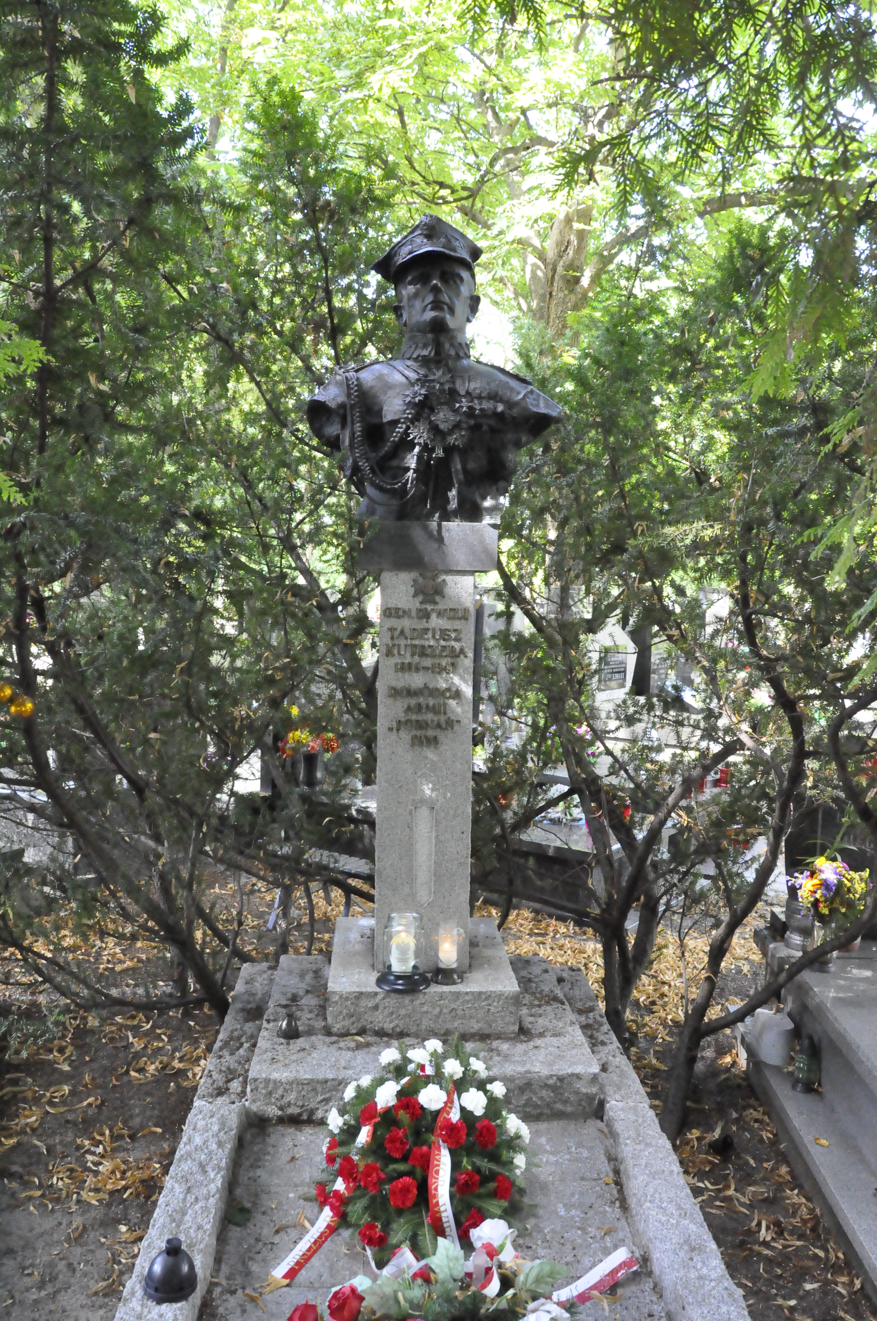 Grób gen. Tadeusza Kutrzeby na Wojskowych Powązkach w Warszawie. Popiersie Generała Tadeusza Kutrzeby autorstwa artysty Maksymiliana Biskupskiego (2019)